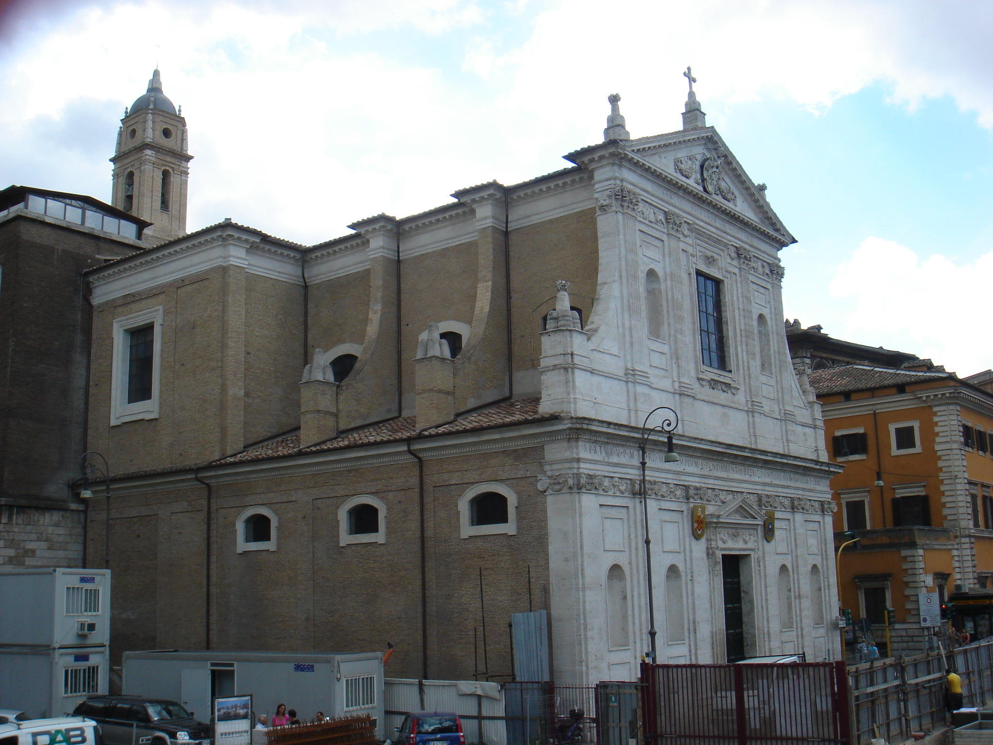 Roma, San Girolamo degli Schiavoni o dei Croati (Campo Marzio)